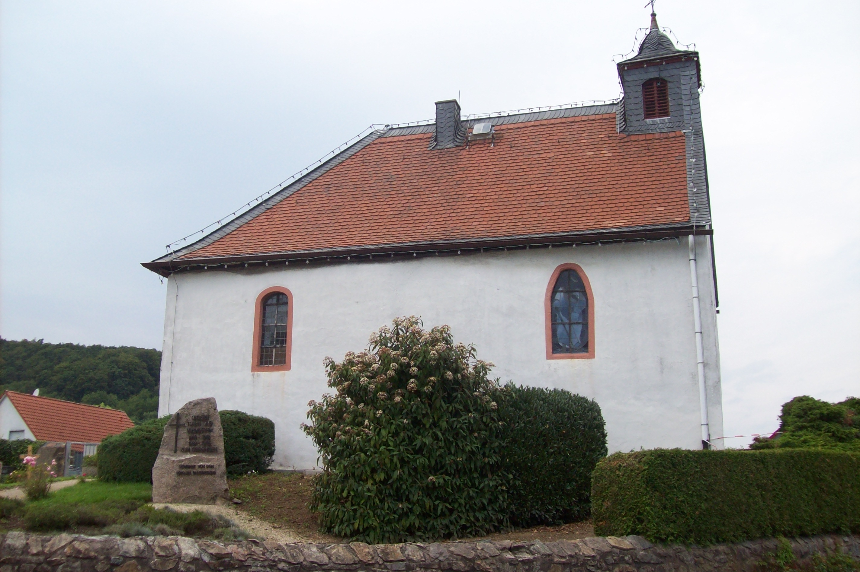 Die evangelischen Kirche in Balkhausen, Seeheim-Jugenheim, Hessen, Deutschland